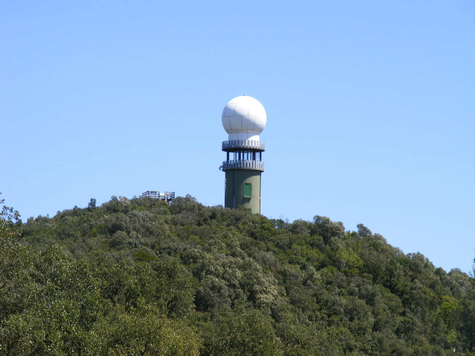 El Puig d'Arques, amb el radar meteorològic